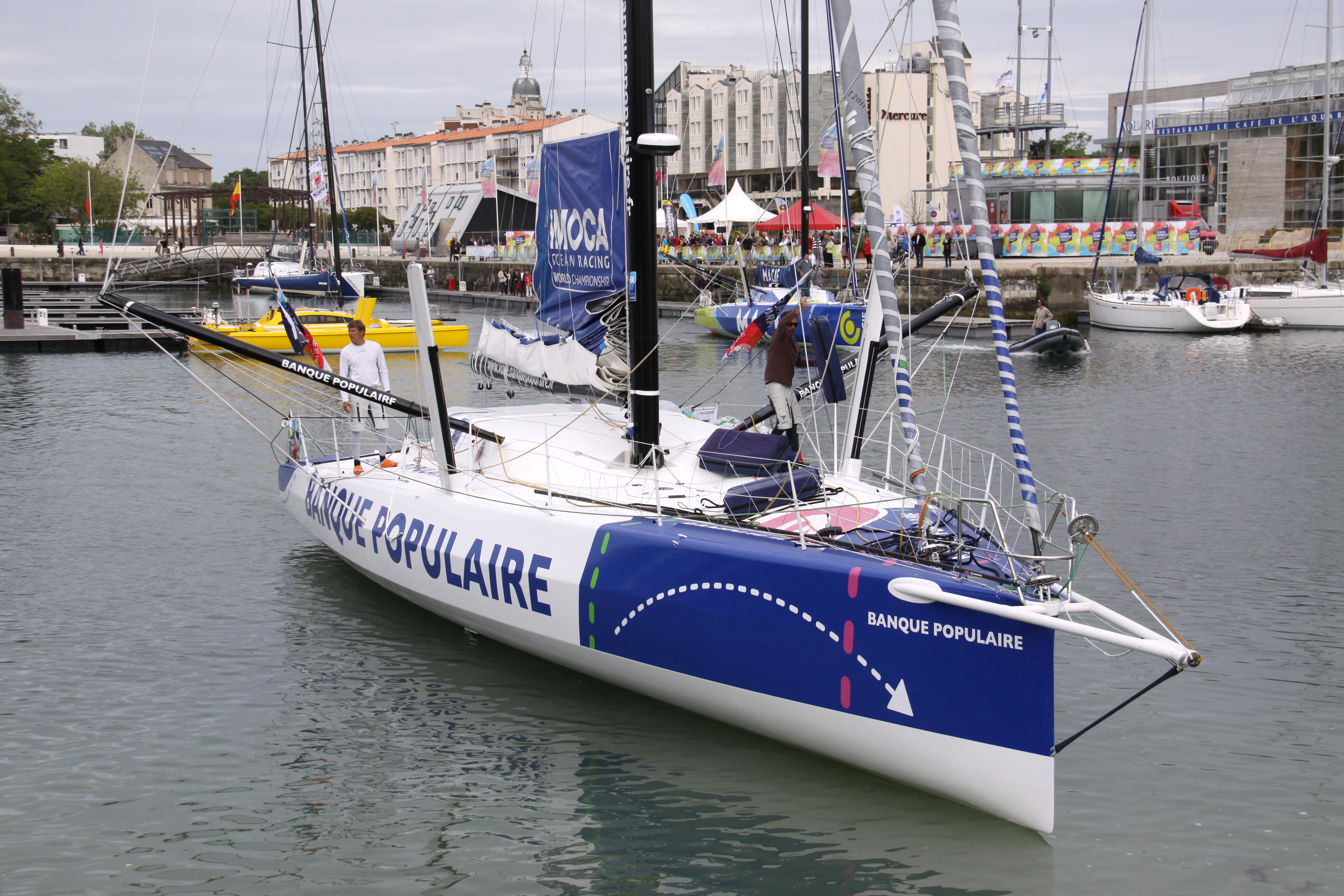 Le voilier le course Open 60 de classe IMOCA « Banque Populaire » dans le Bassin des Chalutiers à La Rochelle, lors de l’ Europa Warm’ Up Race en 2012. La Rochelle fut la ville arrivée de cette course. Le « Banque Populaire » a été lancé en 2010. Ce bateau fut troisième dans l’ Europa Warm’ Up Race et second de la course à la voile autour du monde Vendée Globe 2012-2013. Skipper: Armel Le Cléac’h. La Rochelle, Charente Maritime, France.